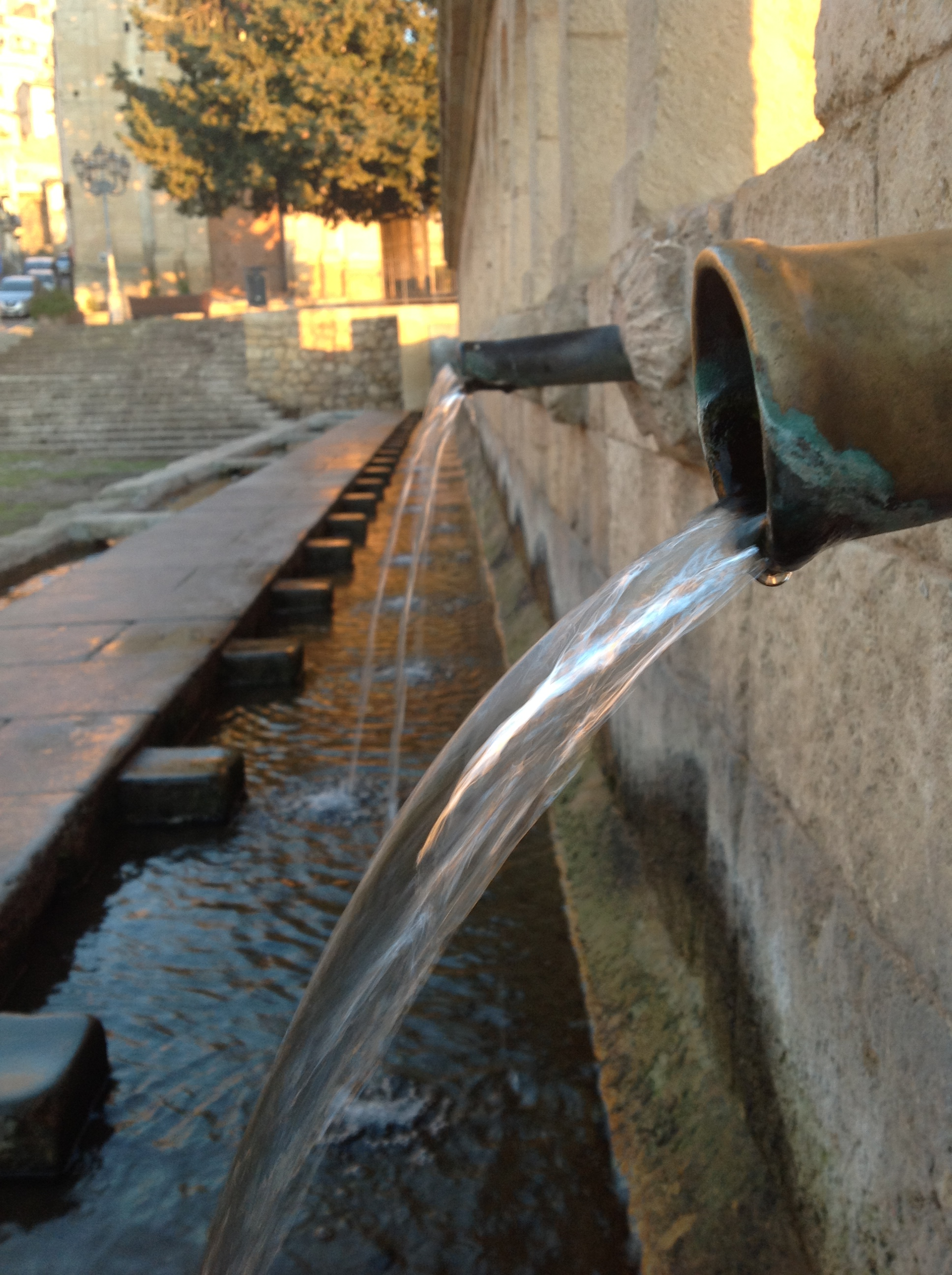 Fontana "Granforte" This is a photo of a monument which is part of cultural heritage of Italy.